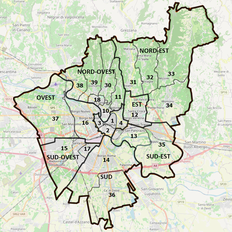 Quartieri e circoscrizioni di Verona Centro storico 1. Città antica 2. Cittadella 3. San Zeno 4. Veronetta Quartieri moderni 10. Borgo Trento 11. Valdonega 12. Borgo Venezia (che comprende Borgo Trieste) 13. Porto San Pancrazio 14. Borgo Roma 15. Santa Lucia 16. Borgo Milano (che comprende le località di Chievo e Saval) 17. Golosine 18. Ponte Crencano Frazioni 30. Avesa 31. Quinto 32. Santa Maria in Stelle 33. Mizzole 34. Montorio 35. San Michele 36. Cadidavid 37. San Massimo 38. Parona 39. Quinzano This map may be incomplete, and may contain errors. Don't rely solely on it for navigation.